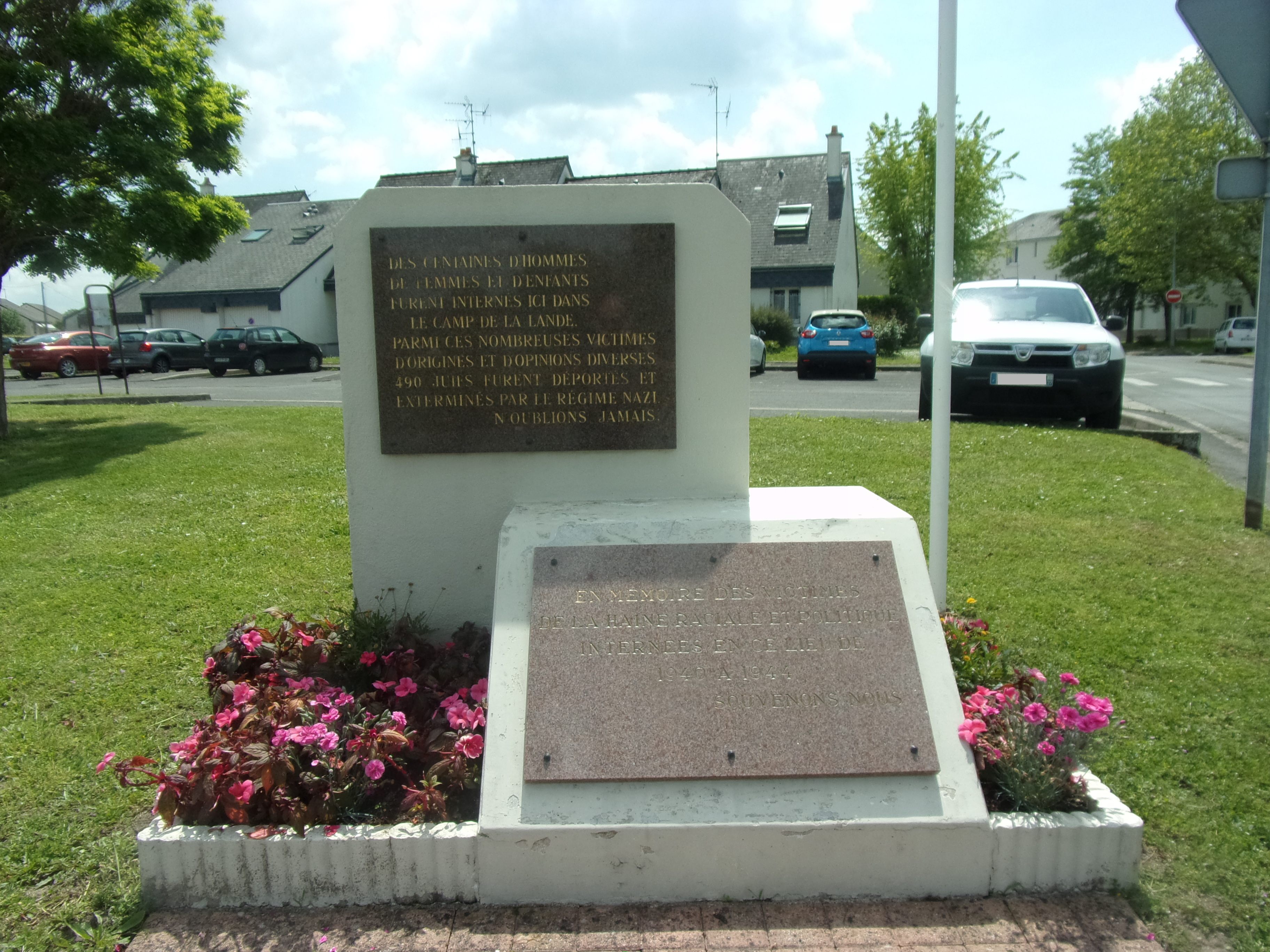 Stèle commémorative à l'entrée de l'ancien camp d’internement de la Lande (Monts, 37)